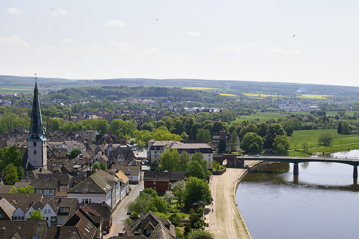 Holzminden, Altstadt und Weserufer